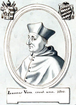 Cardenal Juan Vera (1453-1507)